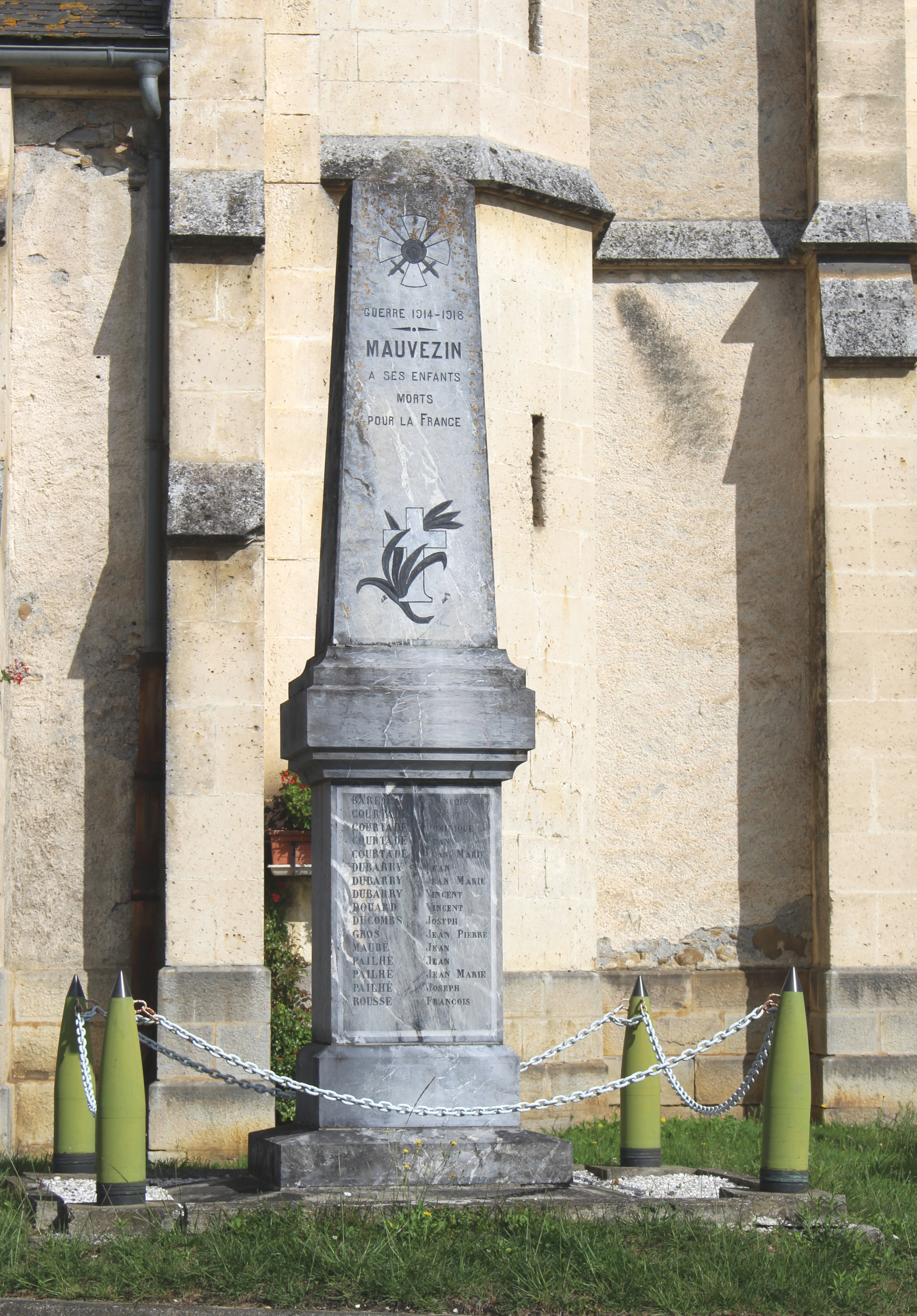 Monument aux morts de Mauvezin (Hautes-Pyrénées)